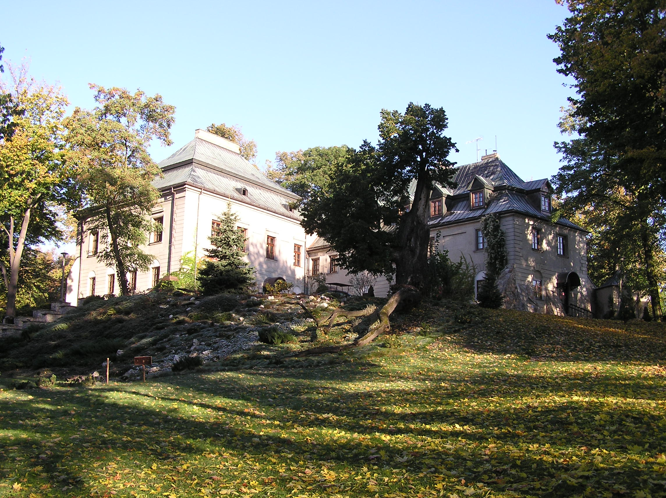 Pałac Odrowążów. Posiadłość "Manor House". Chlewiska k/Szydłowca, woj. mazowieckie